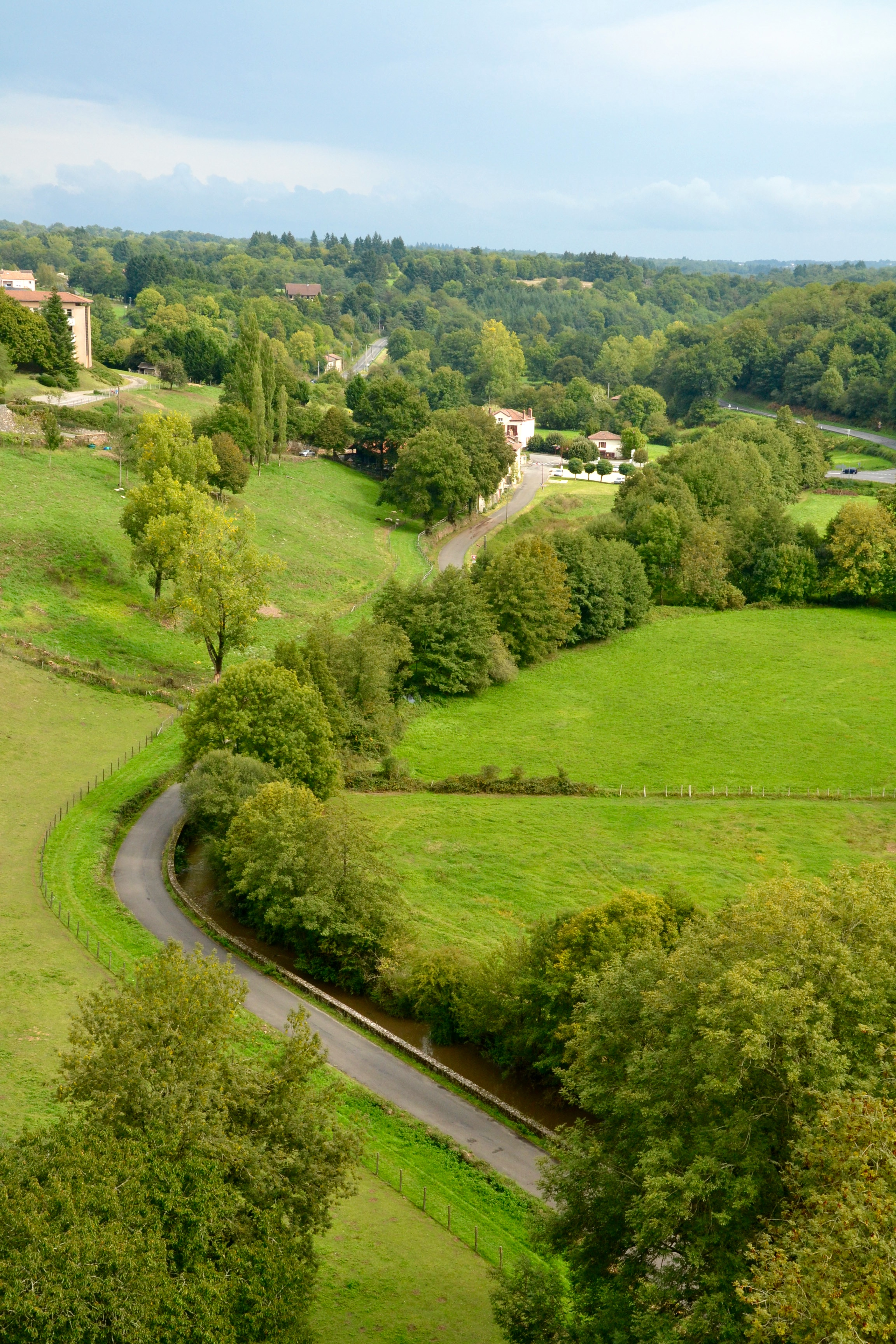 La vallée de la Grêne/Graine à Rochechouart (Haute-Vienne, France).